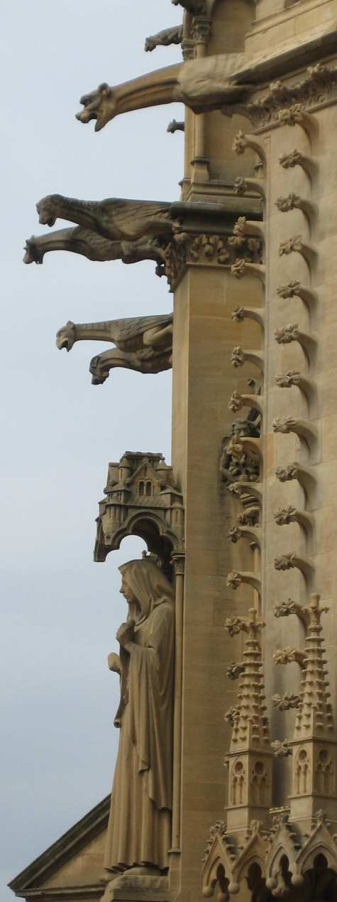 Waasserspäizerten op der Kathedral Saint-Étienne vu Metz. =